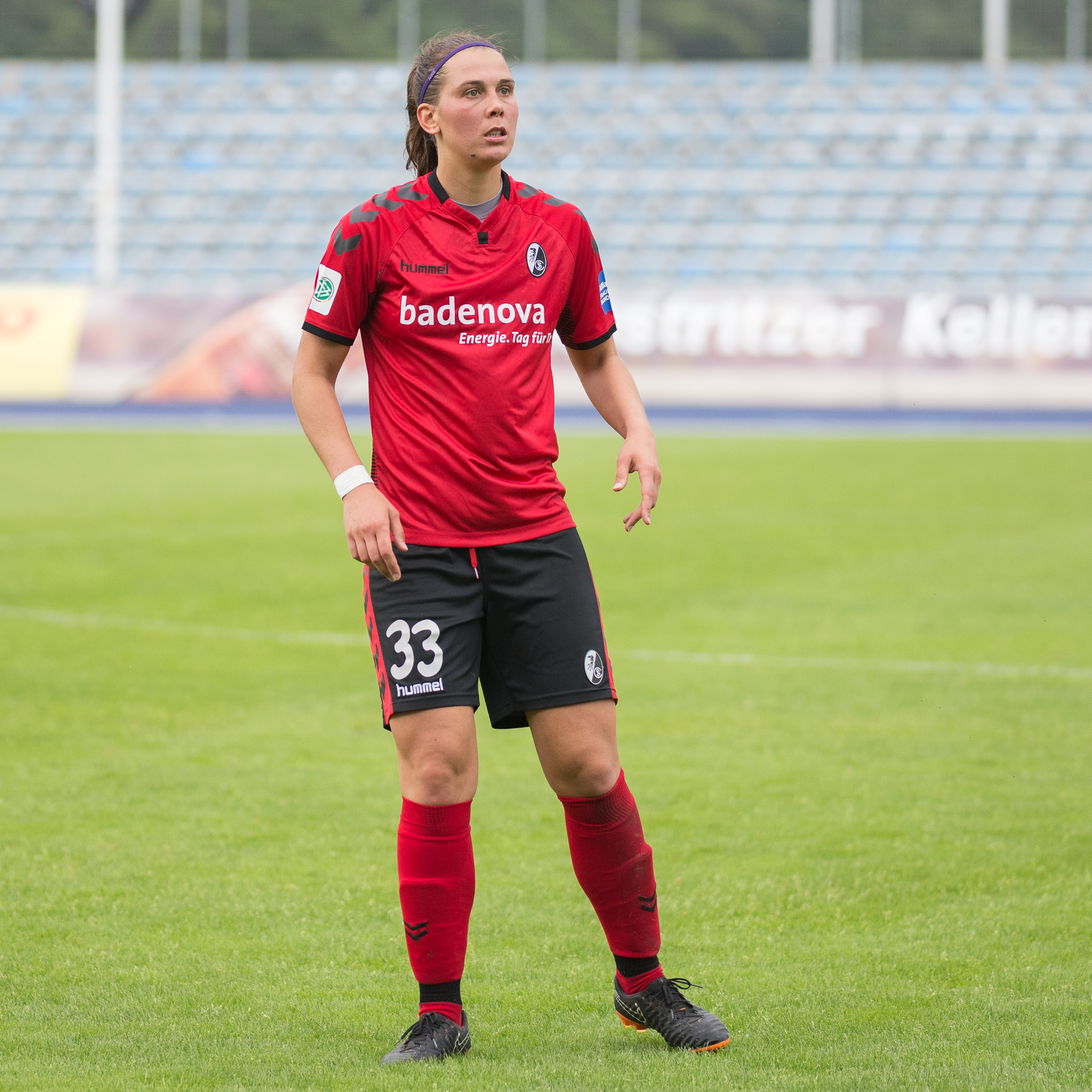 Fußball, Allianz Frauen-Bundesliga, FF USV Jena - SC Freiburg; Carolin Schiewe (SC Freiburg, 33)